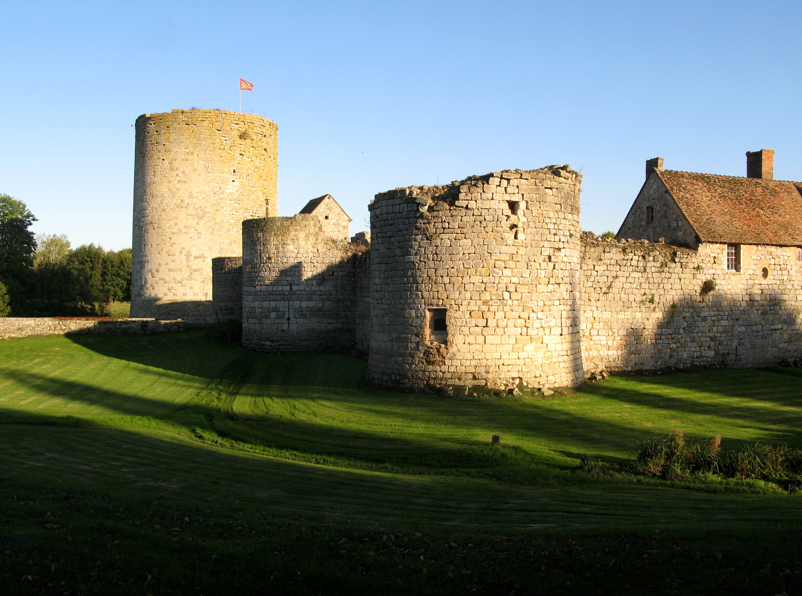 Seringes-et-Nesles (Aisne, France) - Le château de Nesles, vu sous le soleil d'une fin de belle journée d'automne. On remarque que, de ce côté, le fossé n'est - normalement - pas alimenté en eau. Une zone plus verte (non fauchée) au plus creux de ce fossé permet de constater qu'en période pluvieuse celle-ci est couverte d'eau. Curieusement, la tour d'angle du premier plan semble s'évaser en haut. Ce n'est pas un effet d'optique, c'est tout simplement parce que les effondrements à l'intérieur ont poussé vers l'extérieur les pierres du mur qui se fragilise.